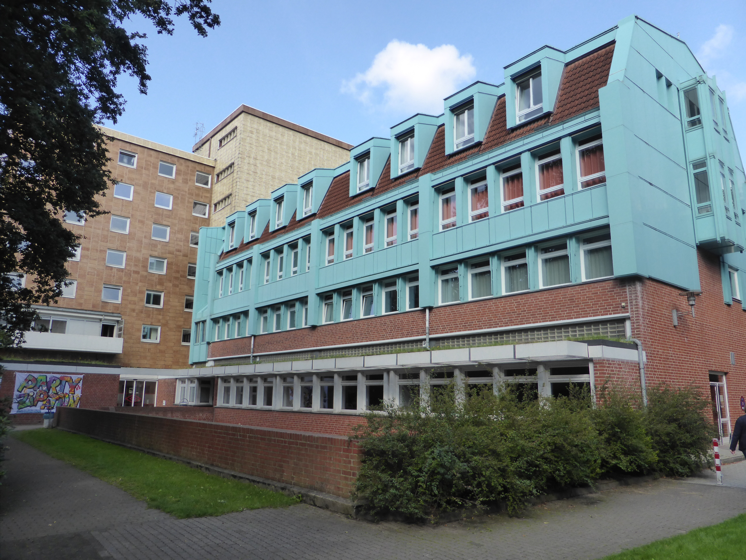 Fachhochschule für Soziale Arbeit, Hamburg-Horn